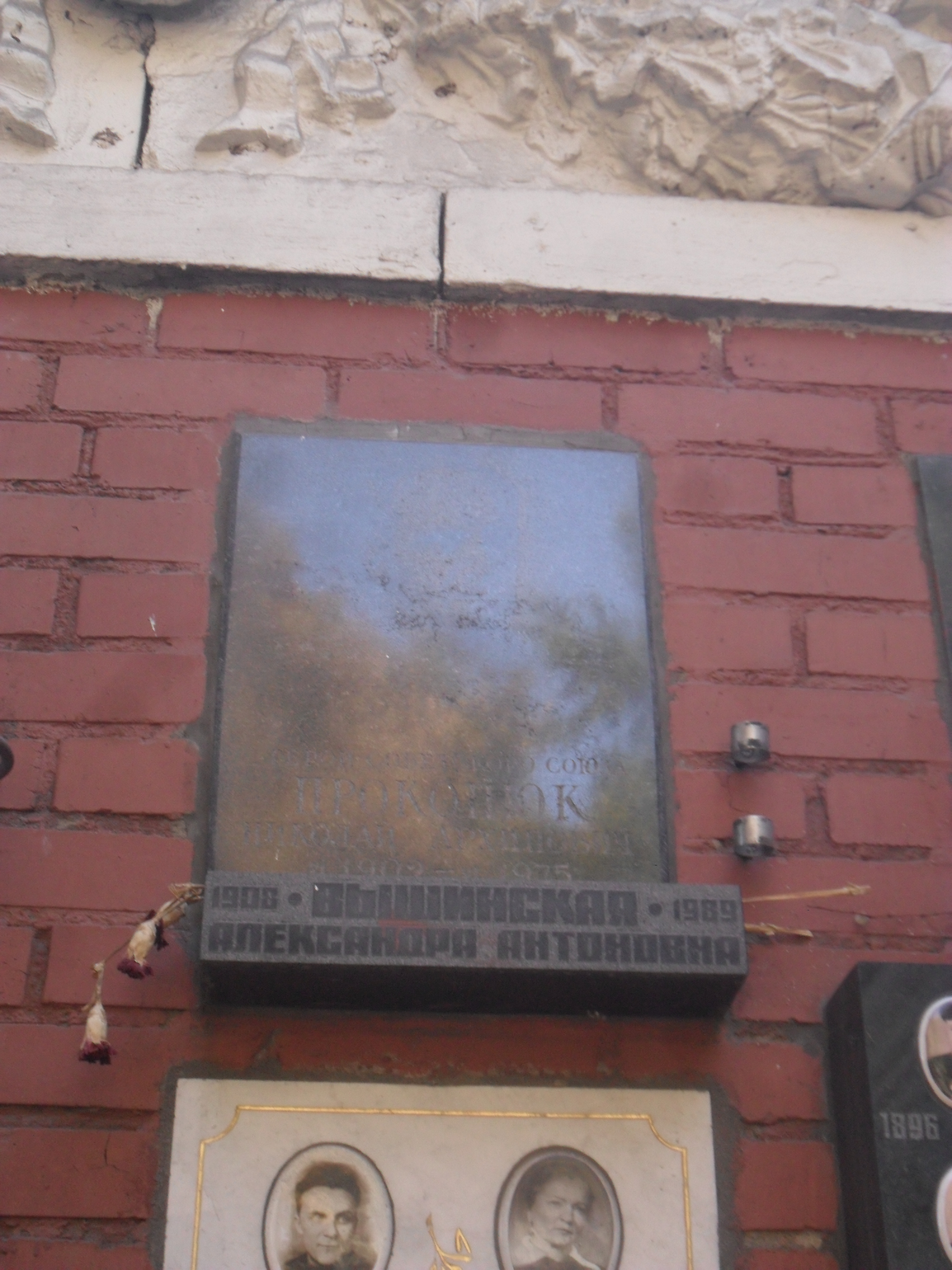 Плита колумбария Героя Советского Союза Николая Прокопюка на Новодевичьем кладбище Москвы.